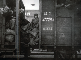 War communism - Refugees